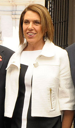 Vivian Nina Kreutzberger Muchnick (n. Santiago de Chile, 28 de agosto de 1965), mejor conocida como La Vivi, es una destacada presentadora de televisión chilena, hija del también presentador de televisión Mario Kreutzberger, conocido como Don Francisco.